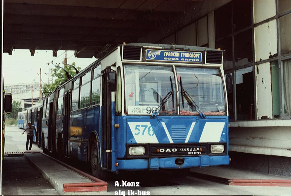 Тролейбусът е в депо през 1998 г.